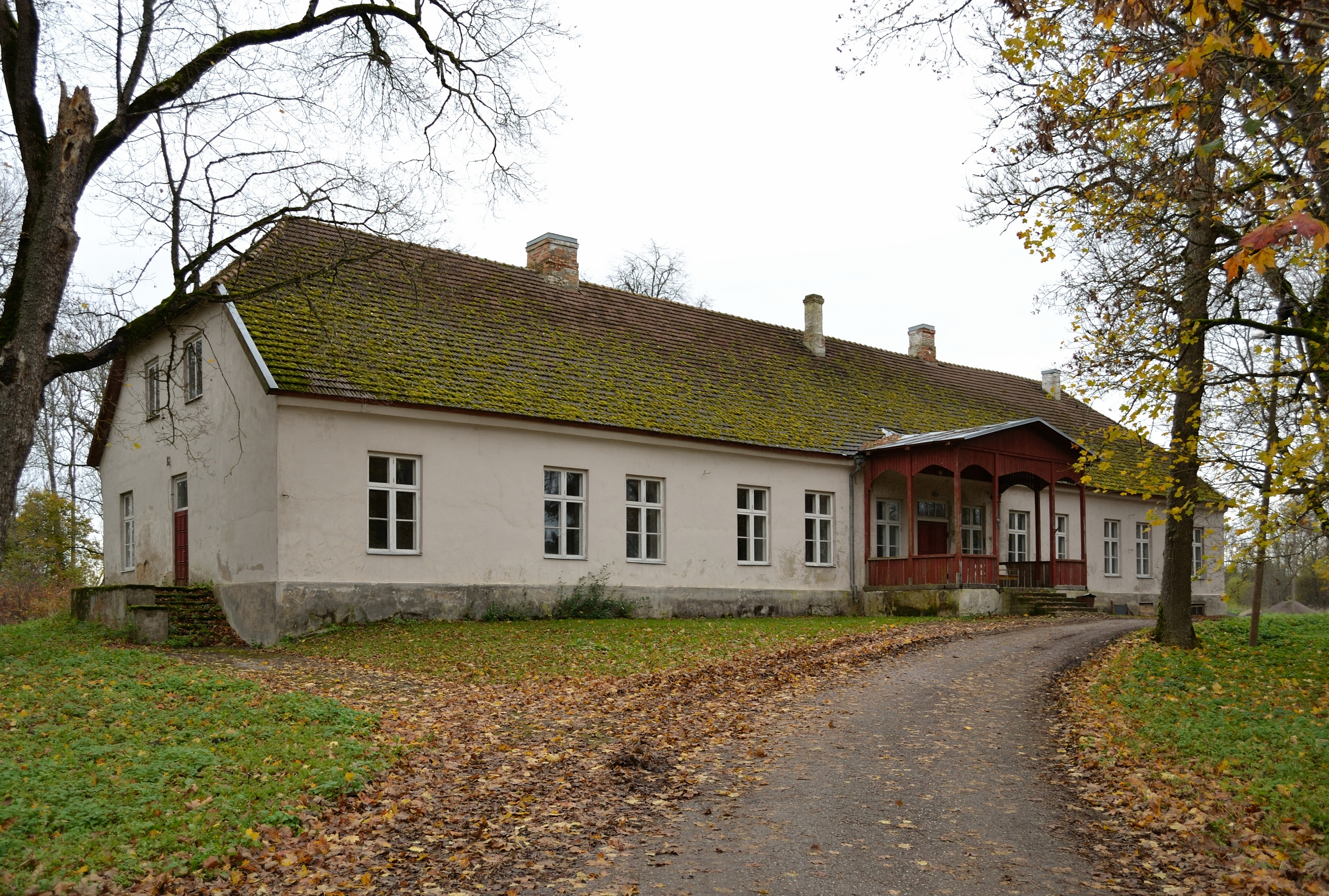 Rabivere mõisa peahoone